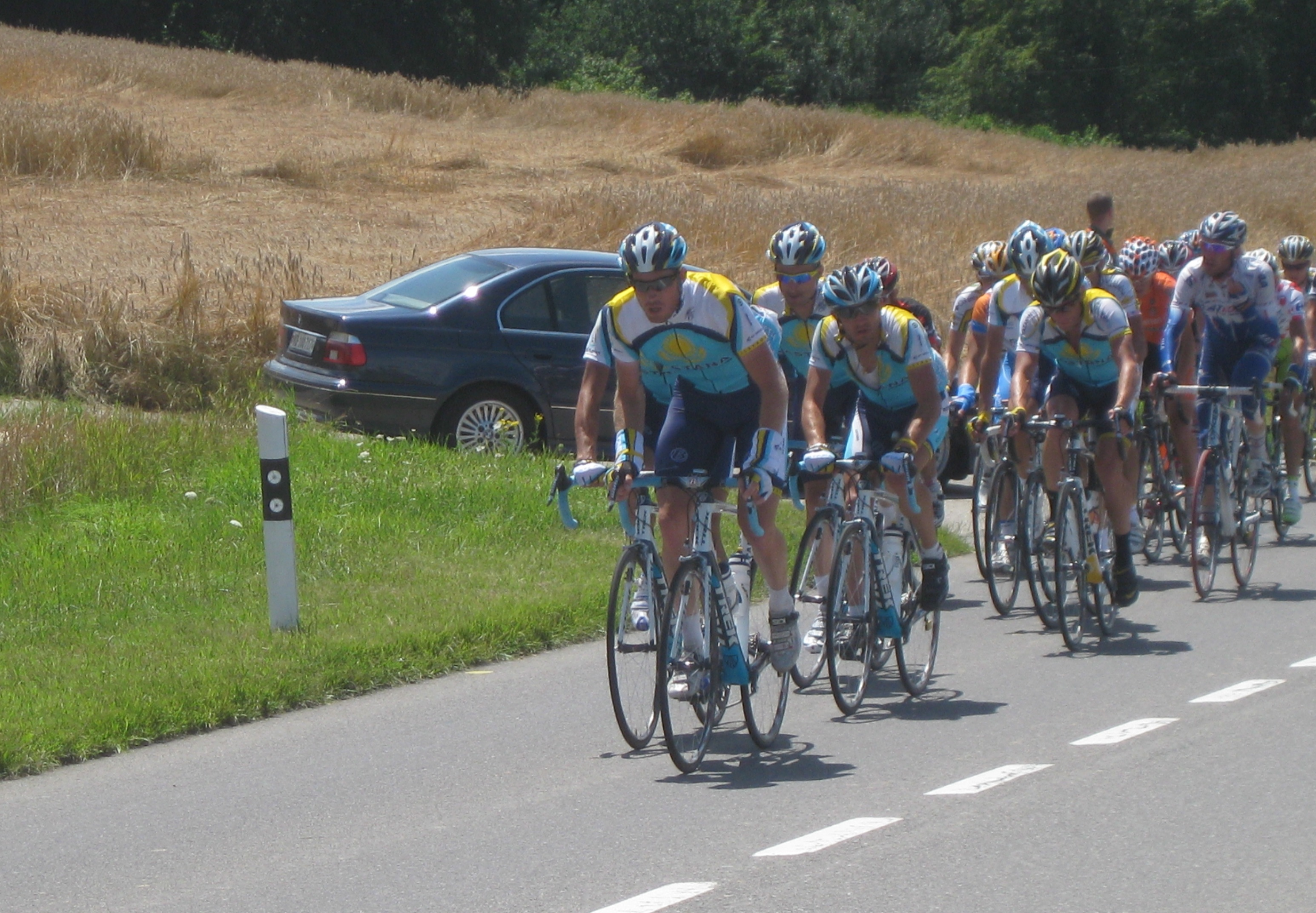 Les coureurs du peloton lors de la 15e étape du Tour de France 2009, à Curtilles dans la montée vers Prévonloup.